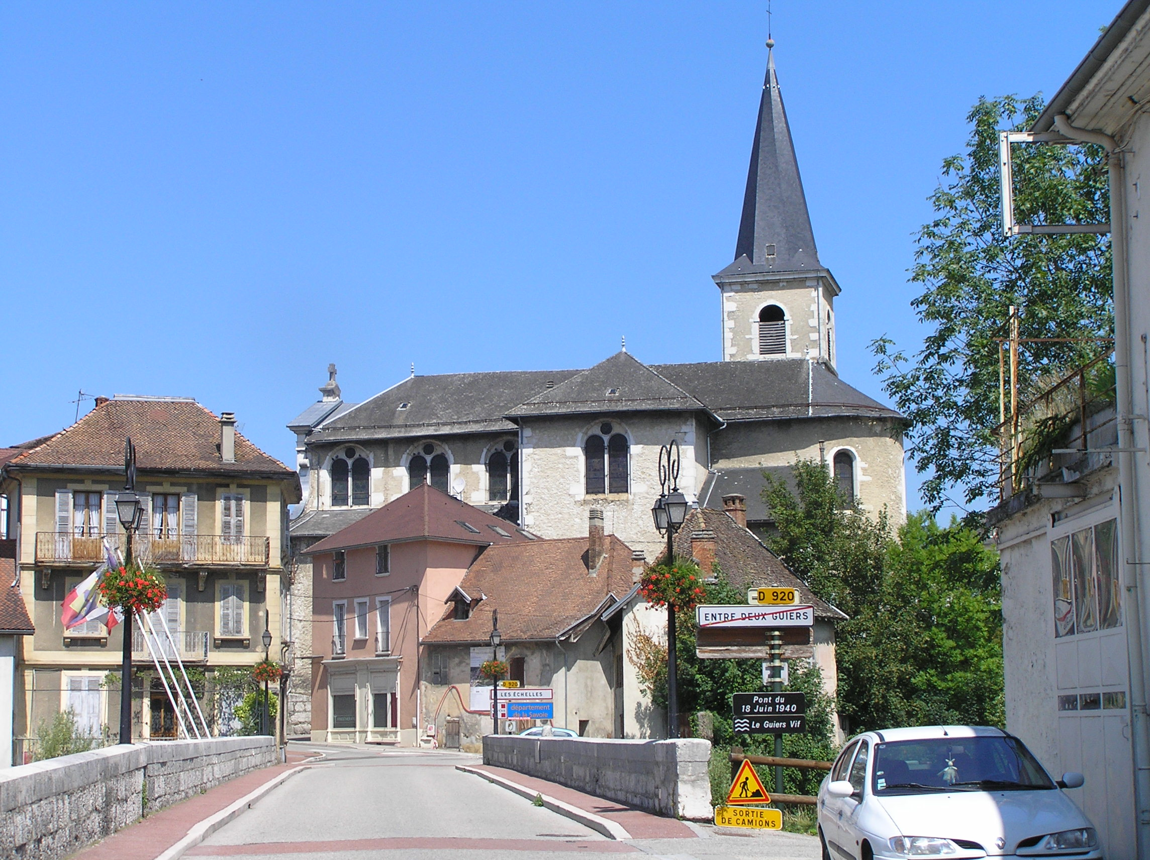 Eglise des Échelles, Savoie, France.